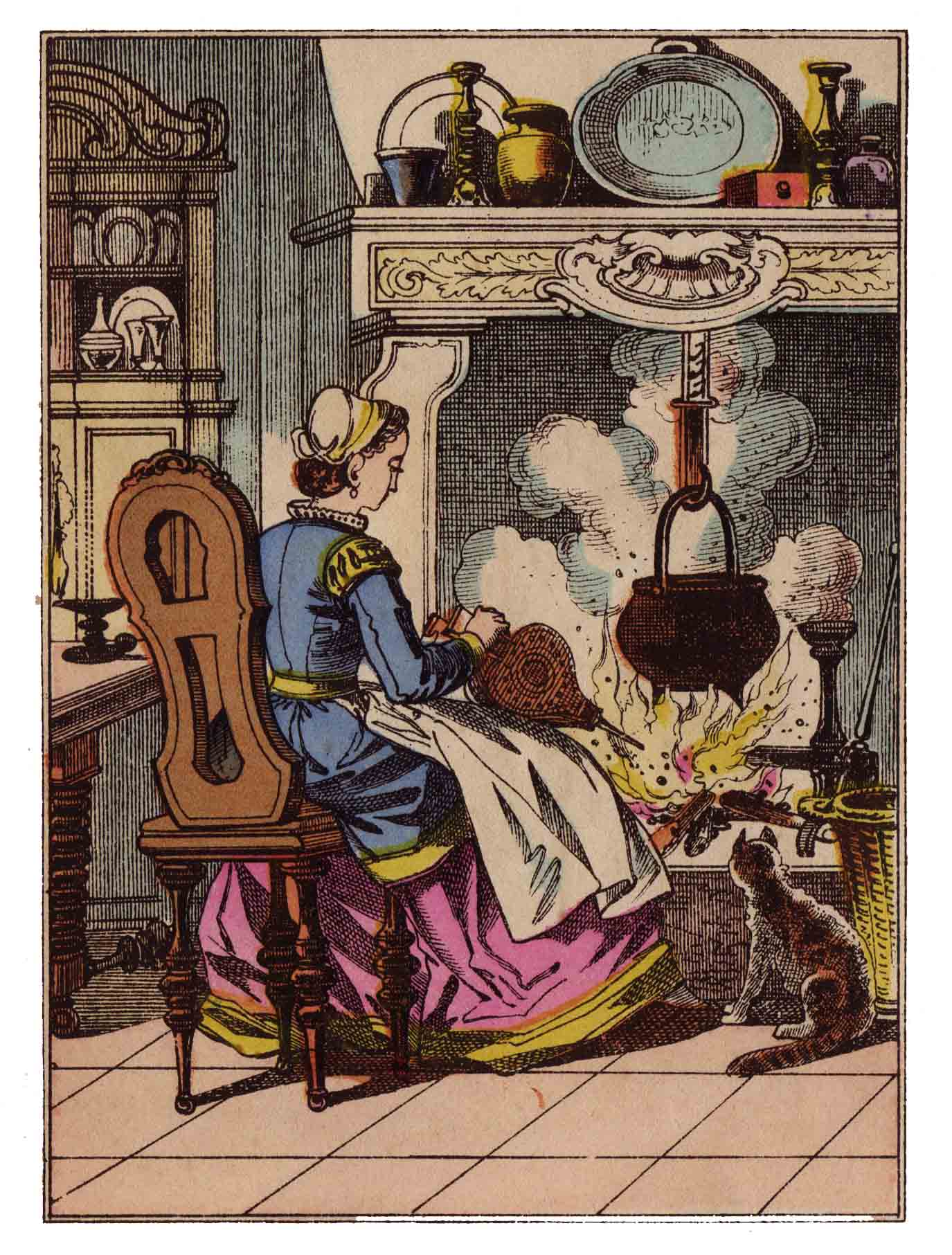 Images d'Épinal : Cendrillon